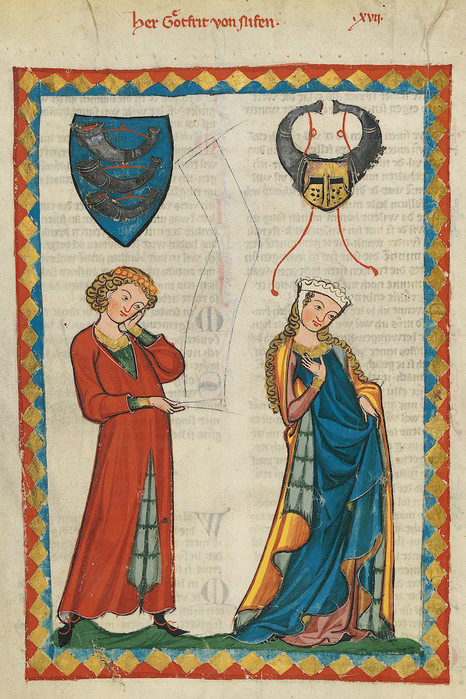 Codex Manesse, UB Heidelberg, Cod. Pal. germ. 848, fol. 32v, Gottfried von Neifen